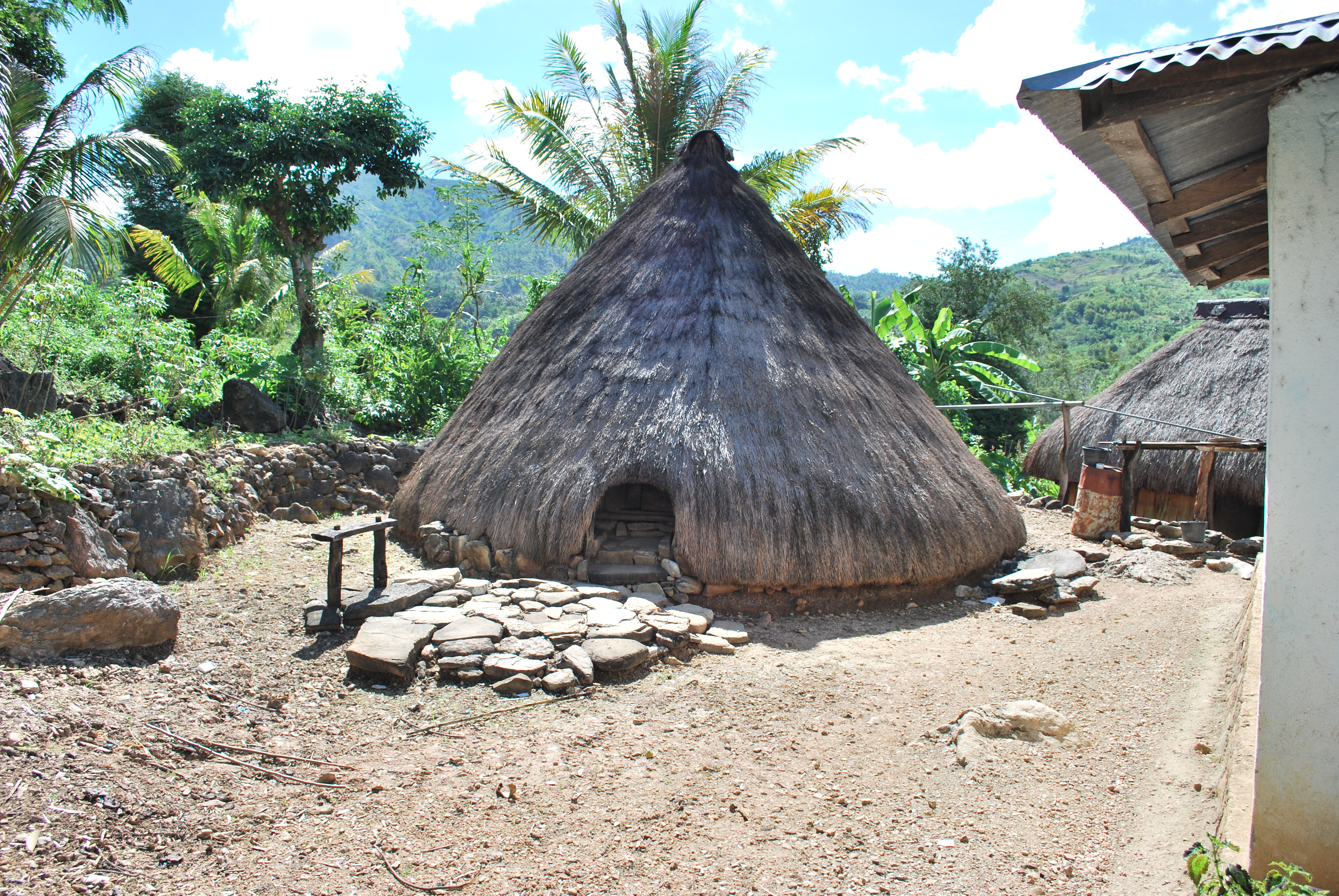 Watu, Abani, Oecusse